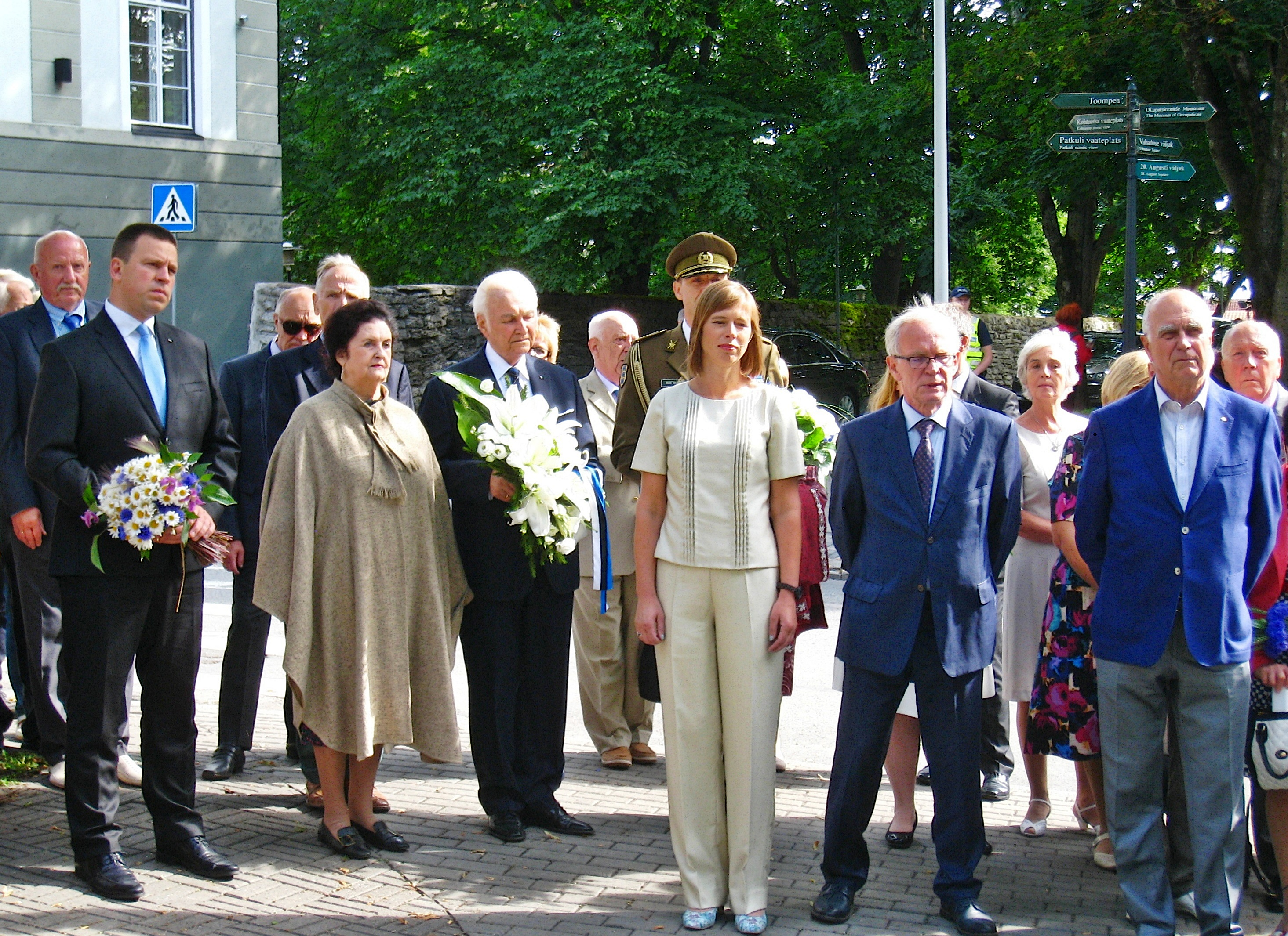 Kogunemine lillede panekuks ja lühikeseks kõneks Tallinnas Toompeal Komandandi maja juures oleva omaaegsetest barrikaadidest võetud graniitrahnu juurde, mis on 20. augusti 1991 mälestuskivi. Vasakult esireas: peaminister Jüri Ratas, president Arnold Rüütel abikaasa Ingridiga, president Kersti Kaljulaid, Riigikogu juhataja Eiki Nestor ja 20. Augusti Klubi asepresident Indrek Toome. Taustal Kaljulaidi ihukaitsja ja Klubi liikmeid.